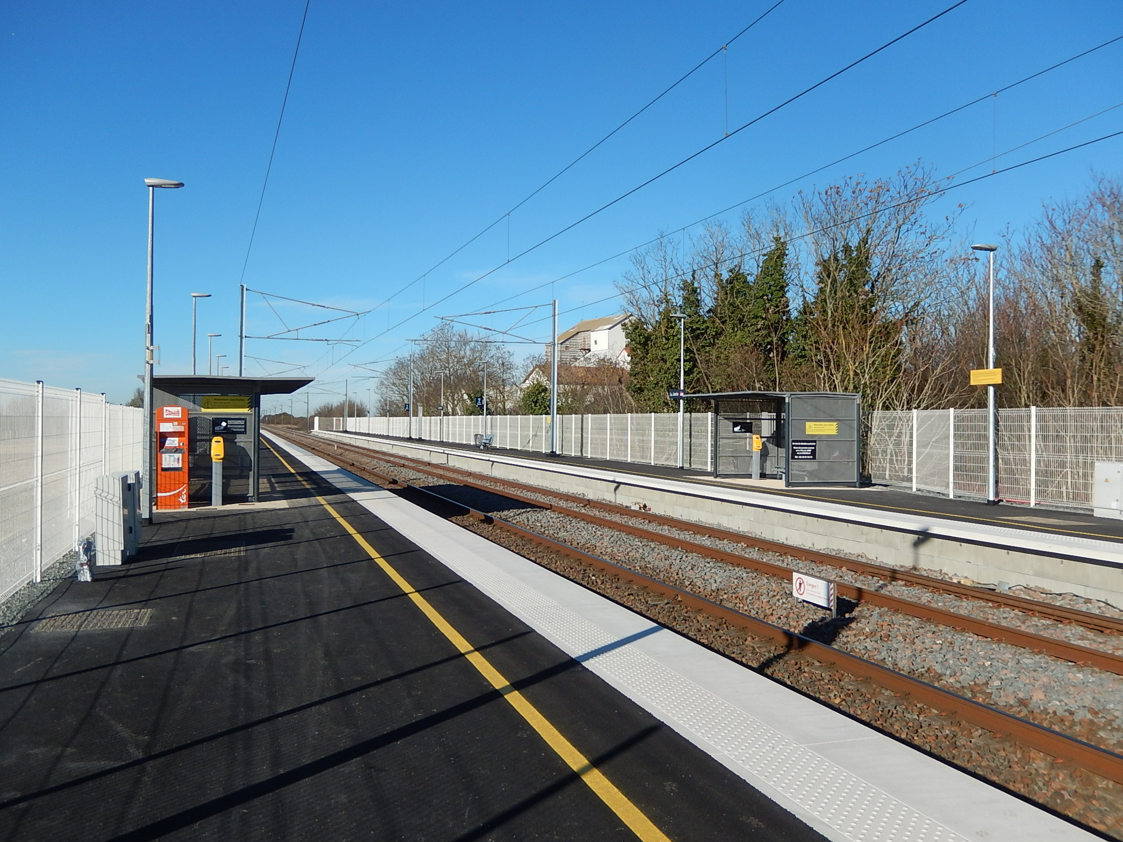 Les quais de la halte ferroviaire de La Jarrie, en Charente-Maritime. Au premier plan, le quai pour les trains en direction de La Rochelle ; à droite au second plan, le quai pour les trains à destination de Niort et Poitiers.